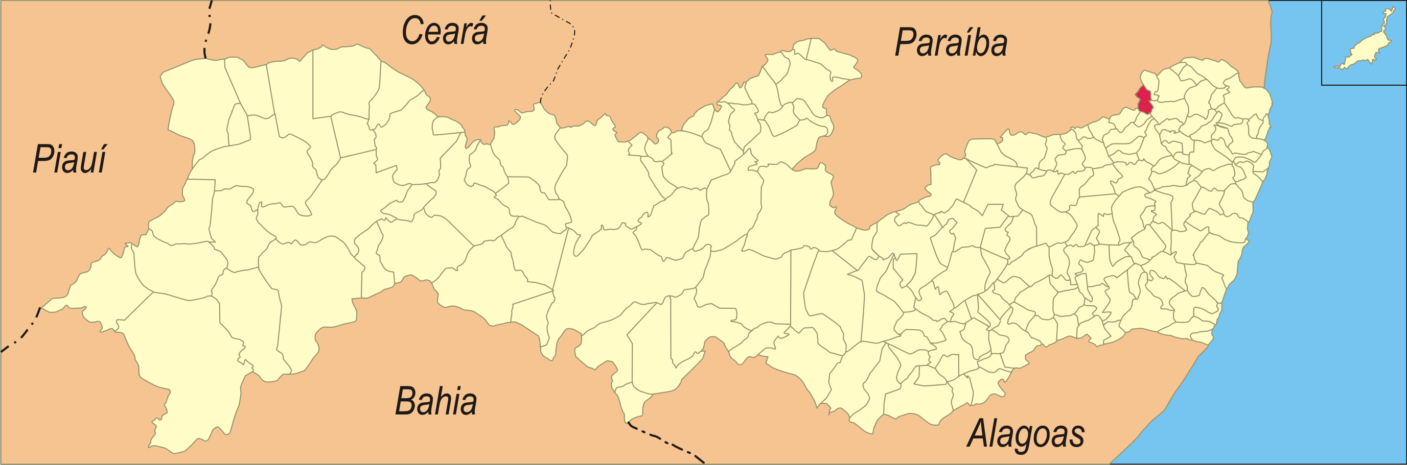 Localização da cidade em Pernambuco